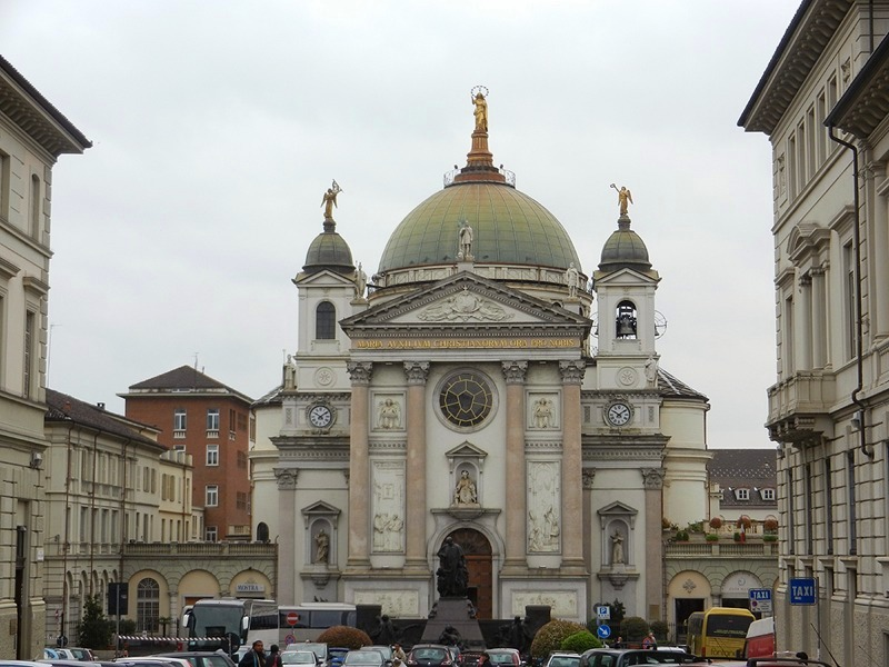 Torino - Santuario di S. Maria Ausiliatrice